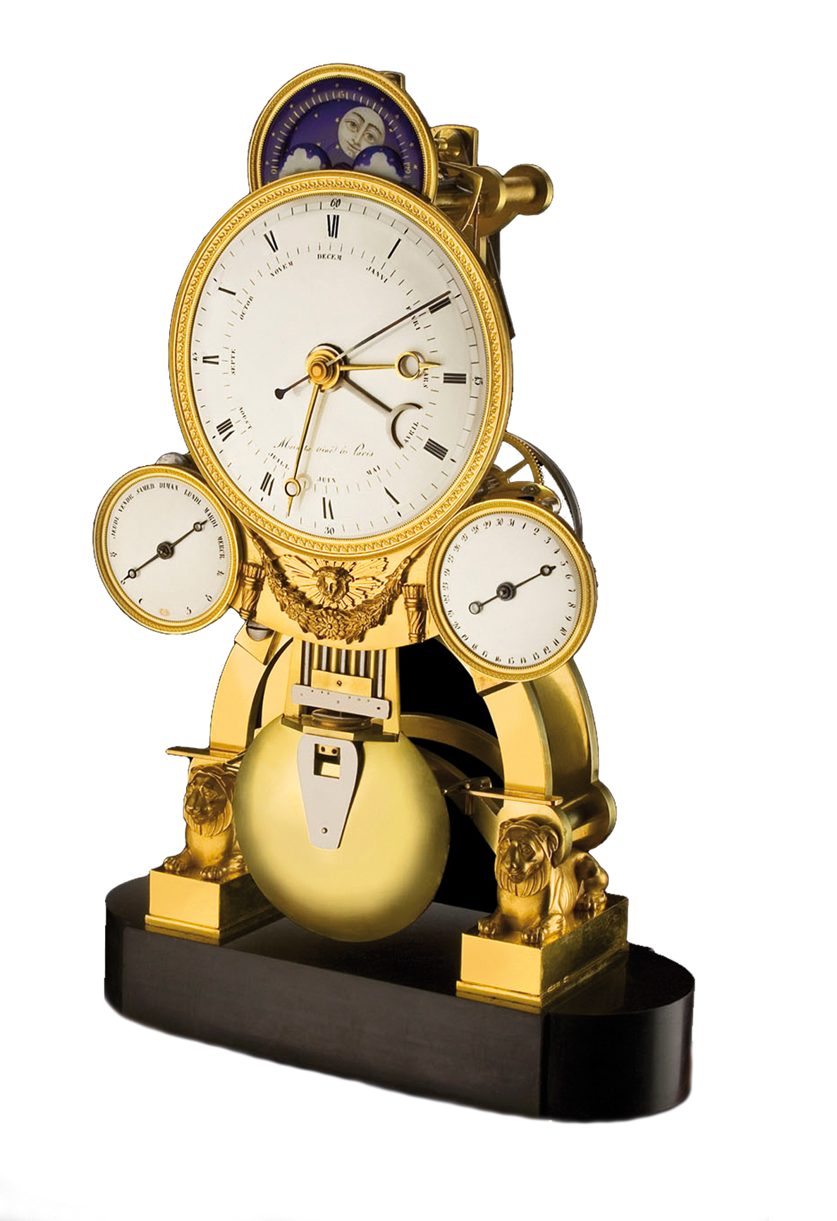 Photographie de la pendule du Maréchal Murat réalisée par Louis Moinet.